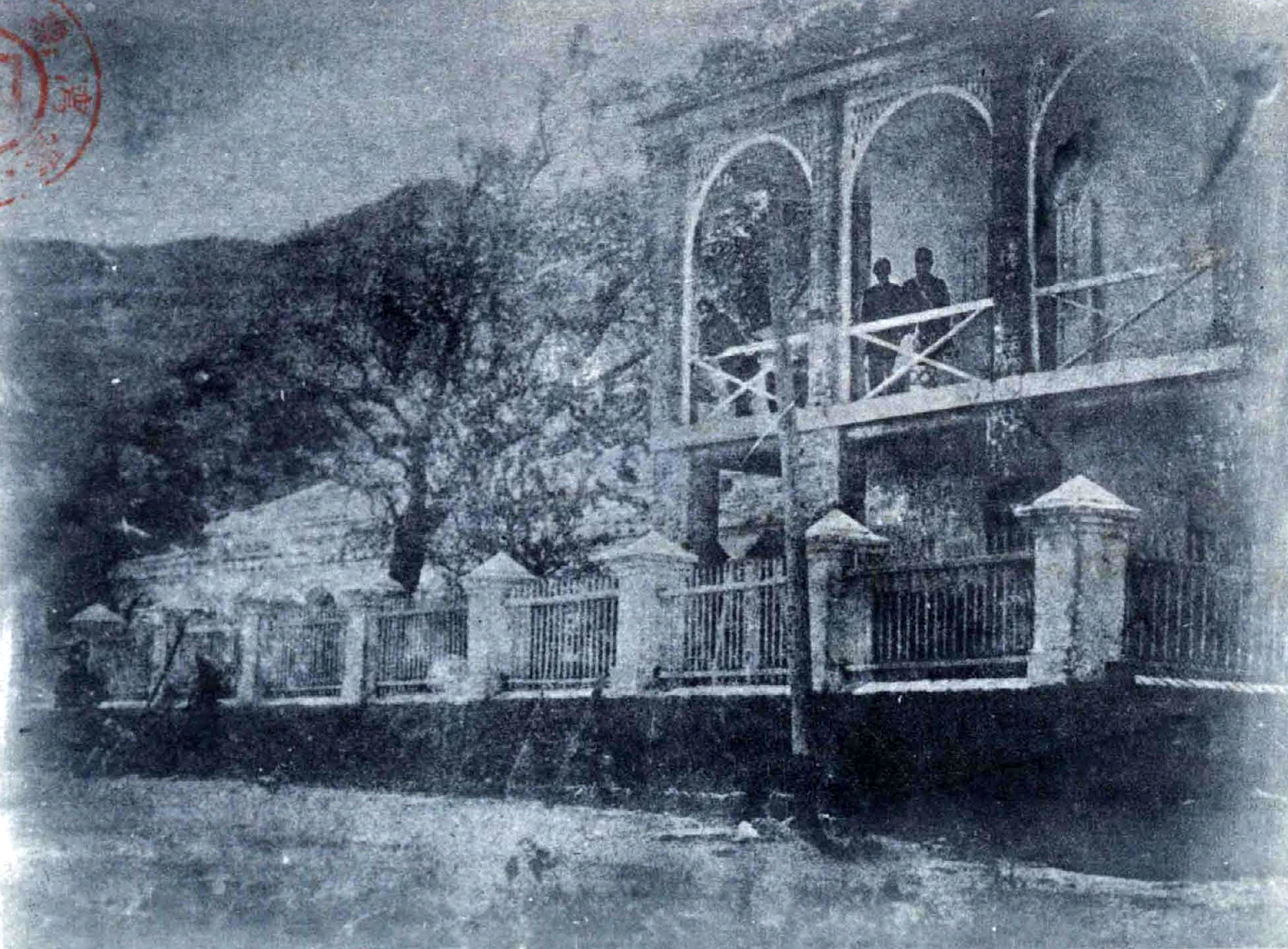 清代建立的基隆海關建築， 北白川宮能久親王和近衛師團在1895年6月曾駐紮此處，後來成為北白川宮御舍營所